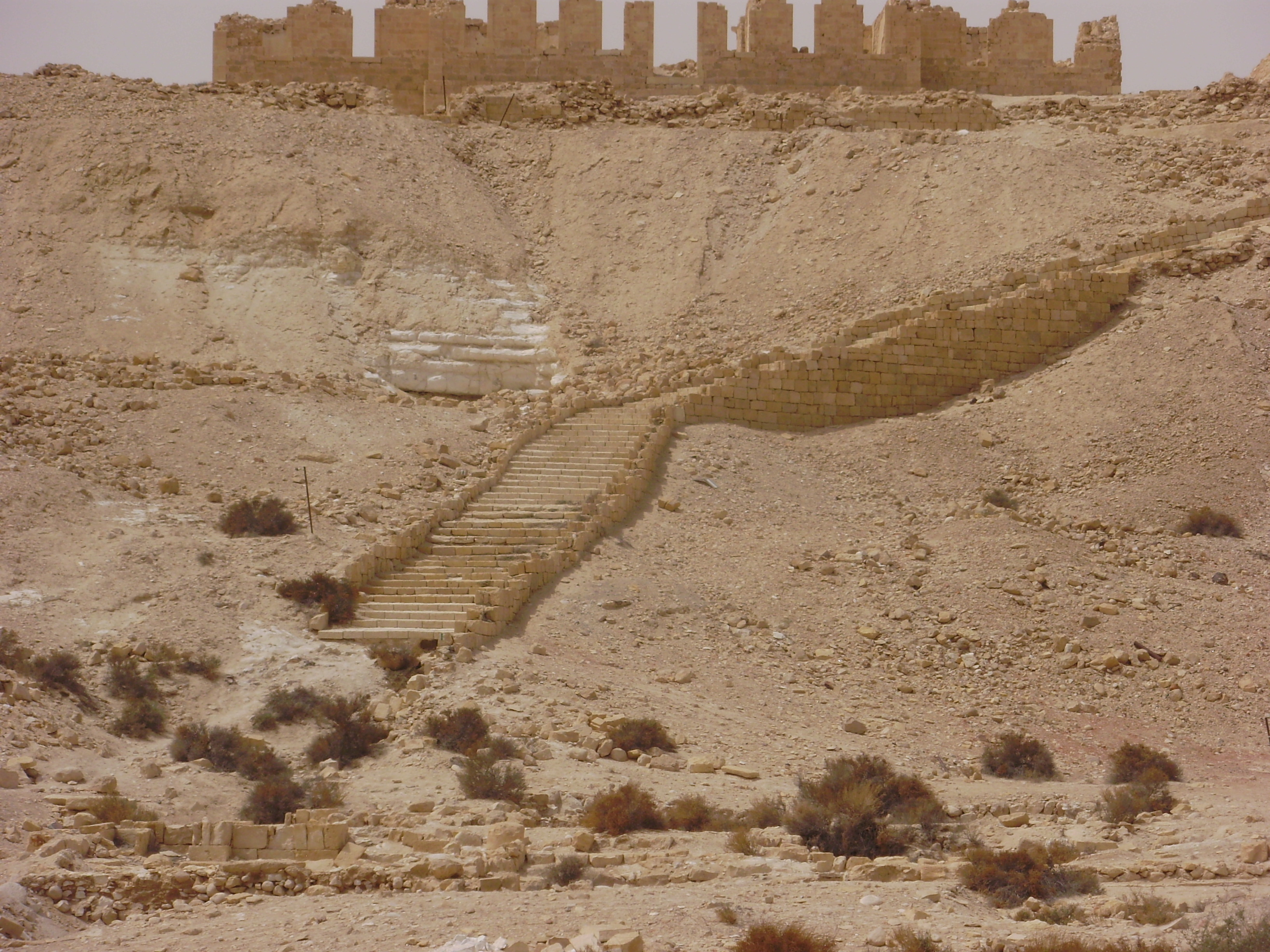 Site archéologique de Tel Nitzana (parfois écrit Nizzana).